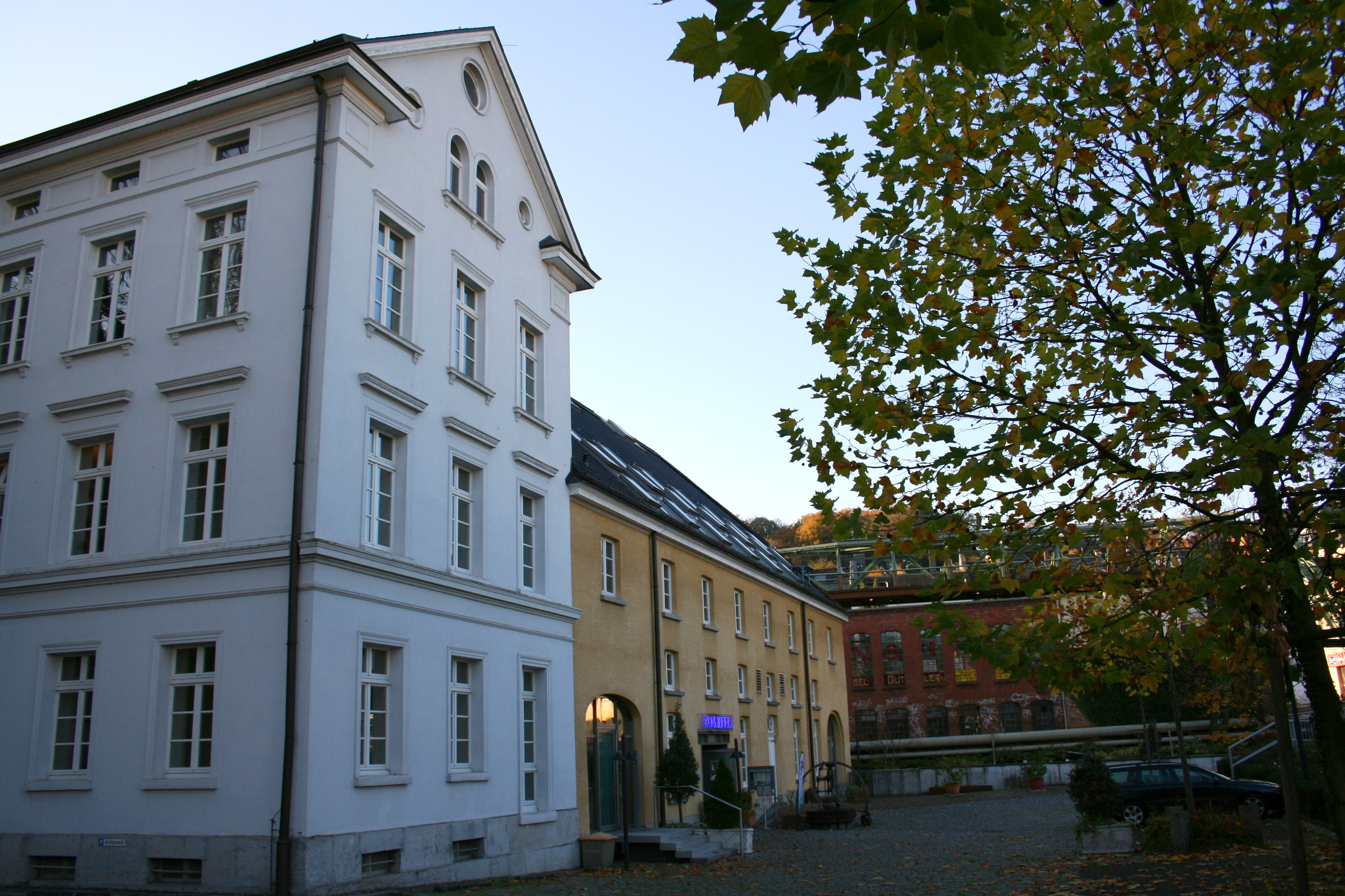 Cleff'sche Mühle in Wuppertal